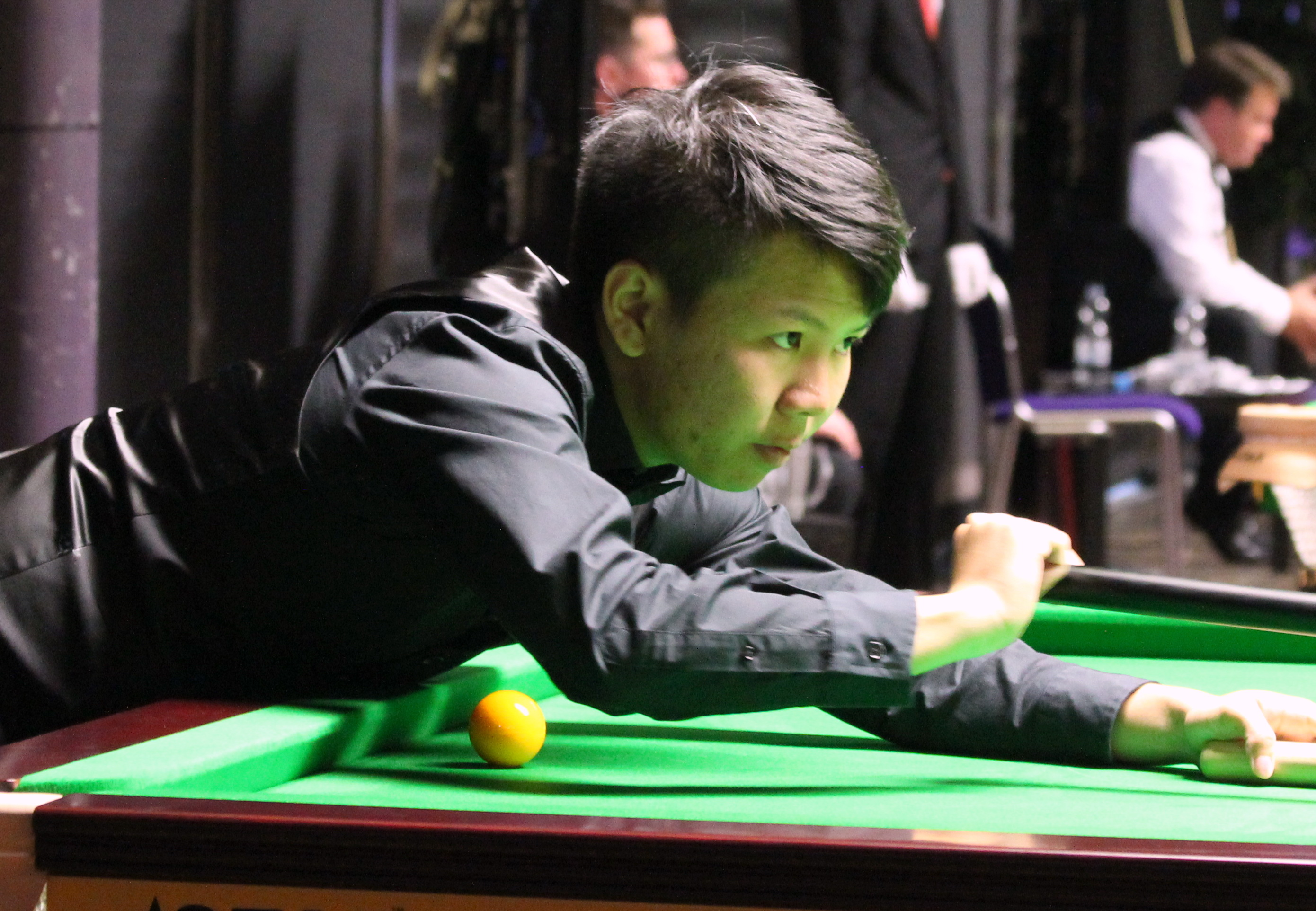 Zhou Yuelong beim Paul Hunter Classic 2016